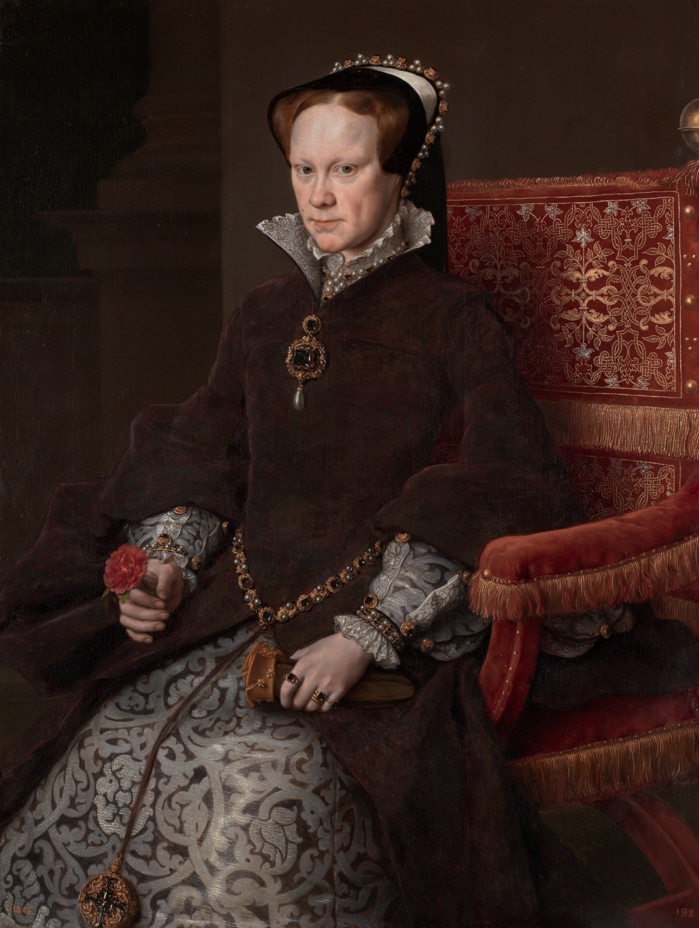 Retrato de la reina María I de Inglaterra (1516-1558), más conocida como María Tudor, que fue hija del rey Enrique VIII de Inglaterra y de la reina Catalina de Aragón y reina consorte de España por su matrimonio con Felipe II, hijo del emperador Carlos I de España.